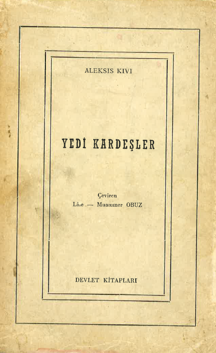 Lâle ve Muammer Obuz'un Yedi Kardeşler çevirisinin kapağı